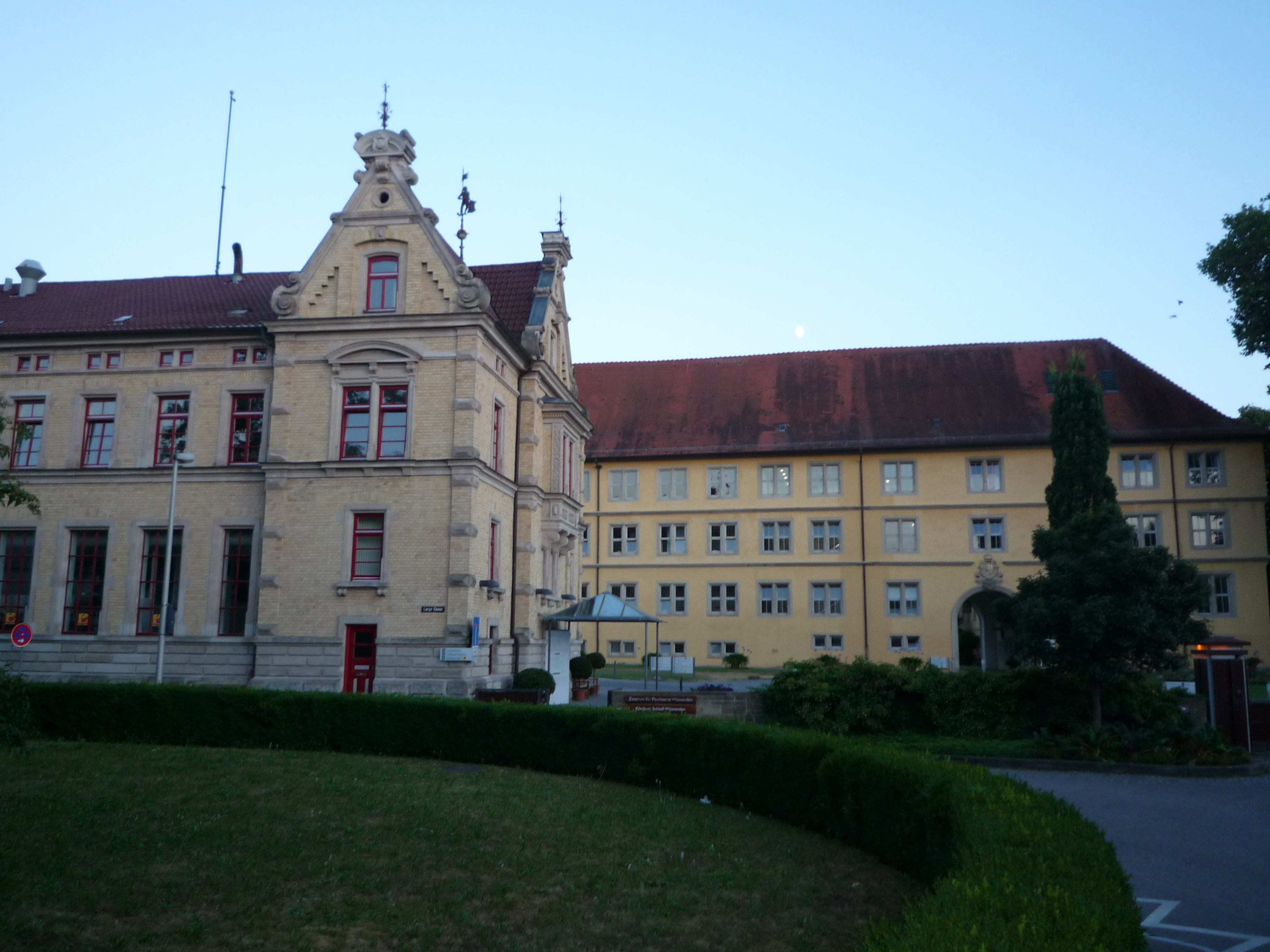 Winnenden - Zentrum für Psychiatrie;Museum und Schlosscafé